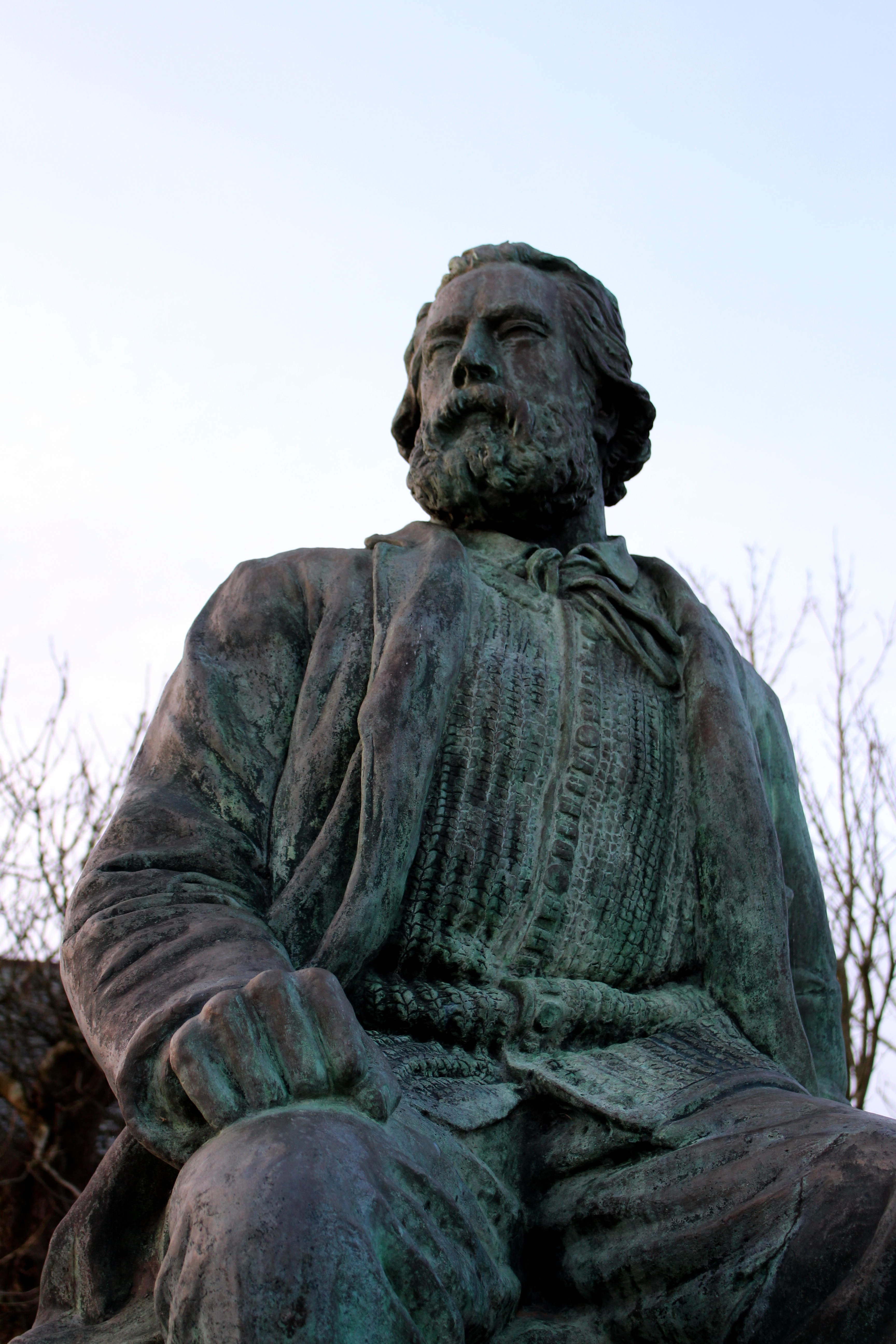 Statue de Jean-François Millet (copie de Louis Derbré)